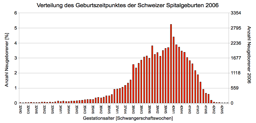 Verteilung des Schwangerschaftsalters der Spitalgeburten in der Schweiz 2006. Von den total 71990 Geburten wurden für die Grafik nur diejenigen verwendet, bei denen der EGT plausibel und der durch Ultraschall bestimmte Geburtstermin nicht mehr als eine Woche vom EGT abwich. Es blieben so noch 55905 auswertbare Geburtstermine.